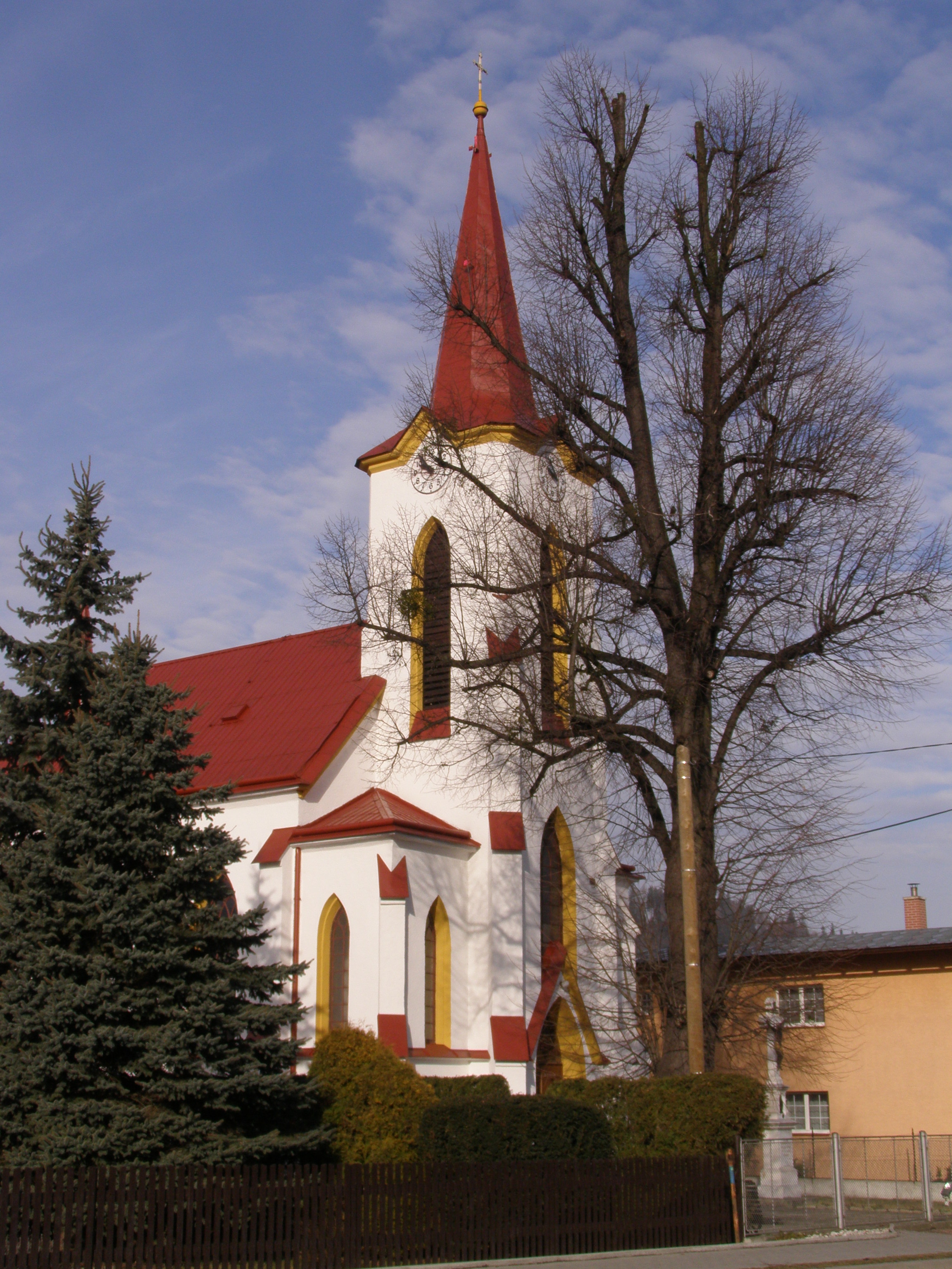 Pržno, kostel Neposkvrněného početí Panny Marie